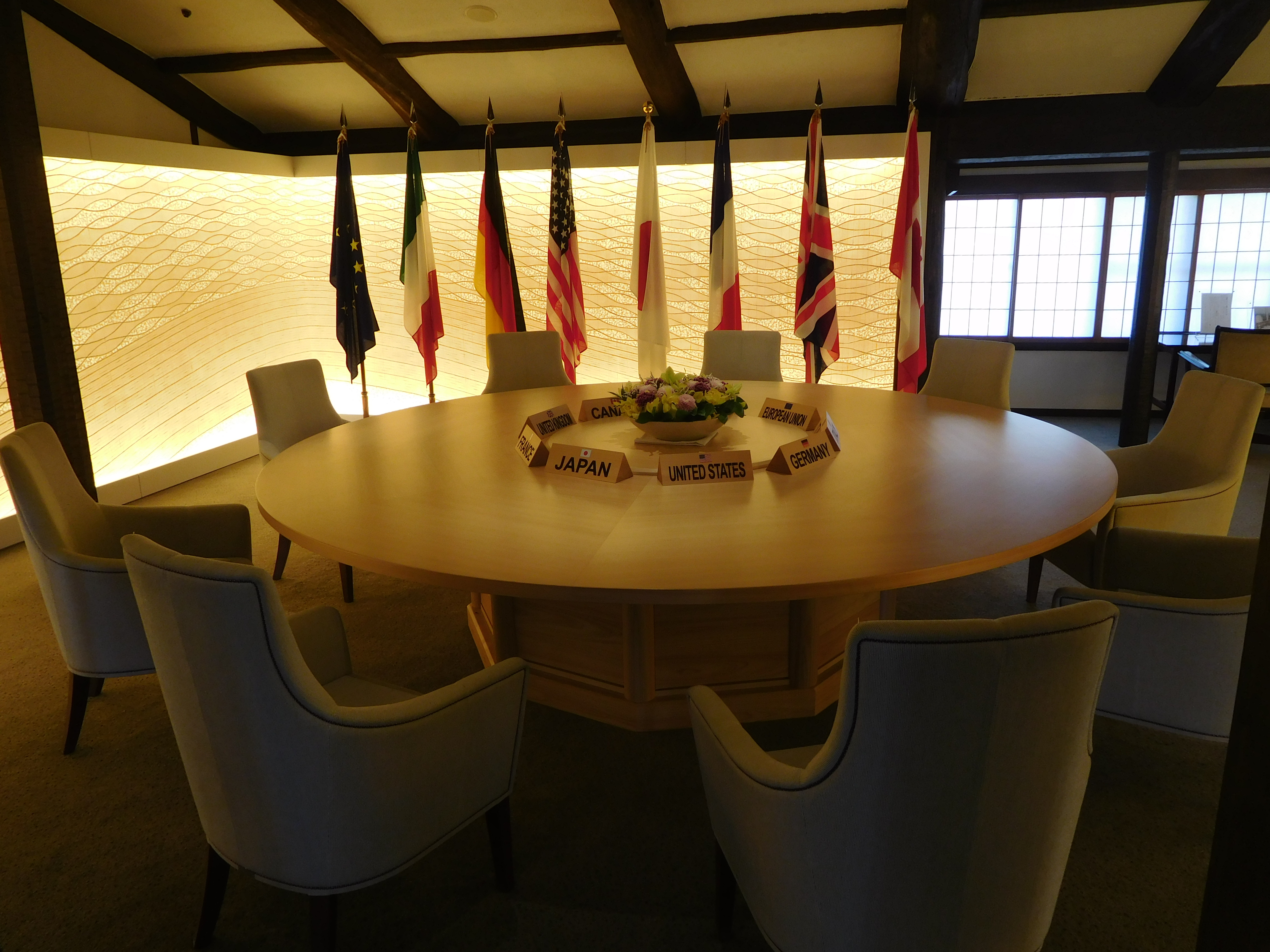 三重県志摩市阿児町神明の賢島にある、志摩観光ホテル ザ クラブの中にある、伊勢志摩サミット記念ギャラリー。